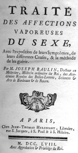 Title page of a work by French physician Joseph Raulin on women's "vapours": "Traité des affections vaporeuses du sexe, avec l'exposition de leurs symptômes, de leurs différentes causes, et la méthode de les guérir" (1758)